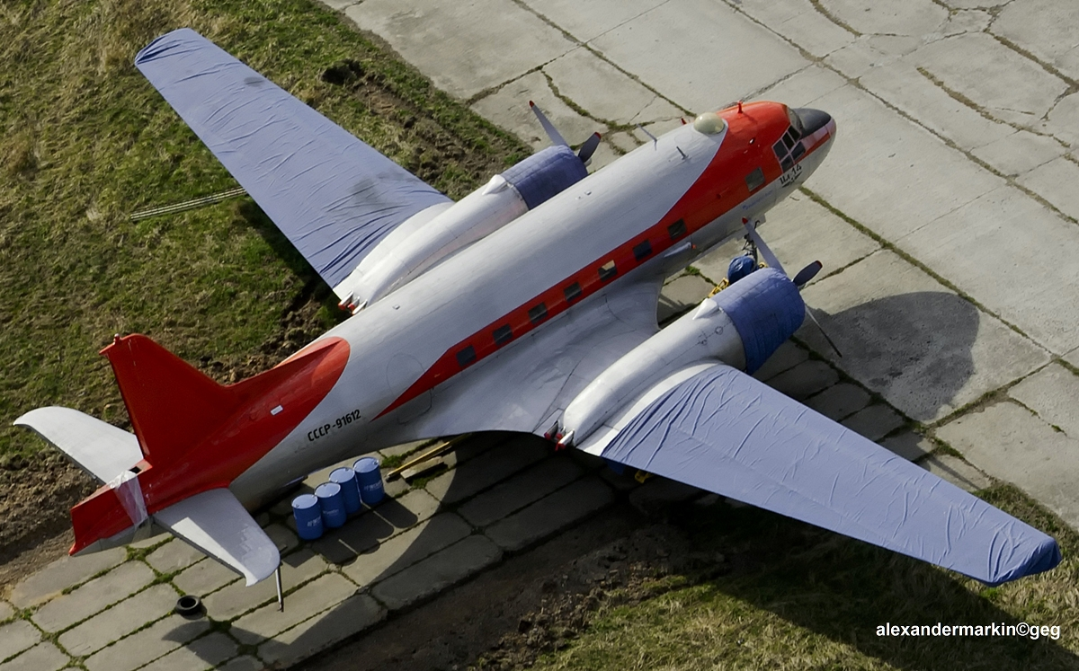 Il-14 RA-1114K(СССР-91612).Airfield Stupino.